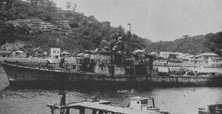 元日本海軍第十三号型駆潜艇 『第四十四号駆潜艇』（手前）、『第十五号駆潜艇』（奥）、浦賀造船所